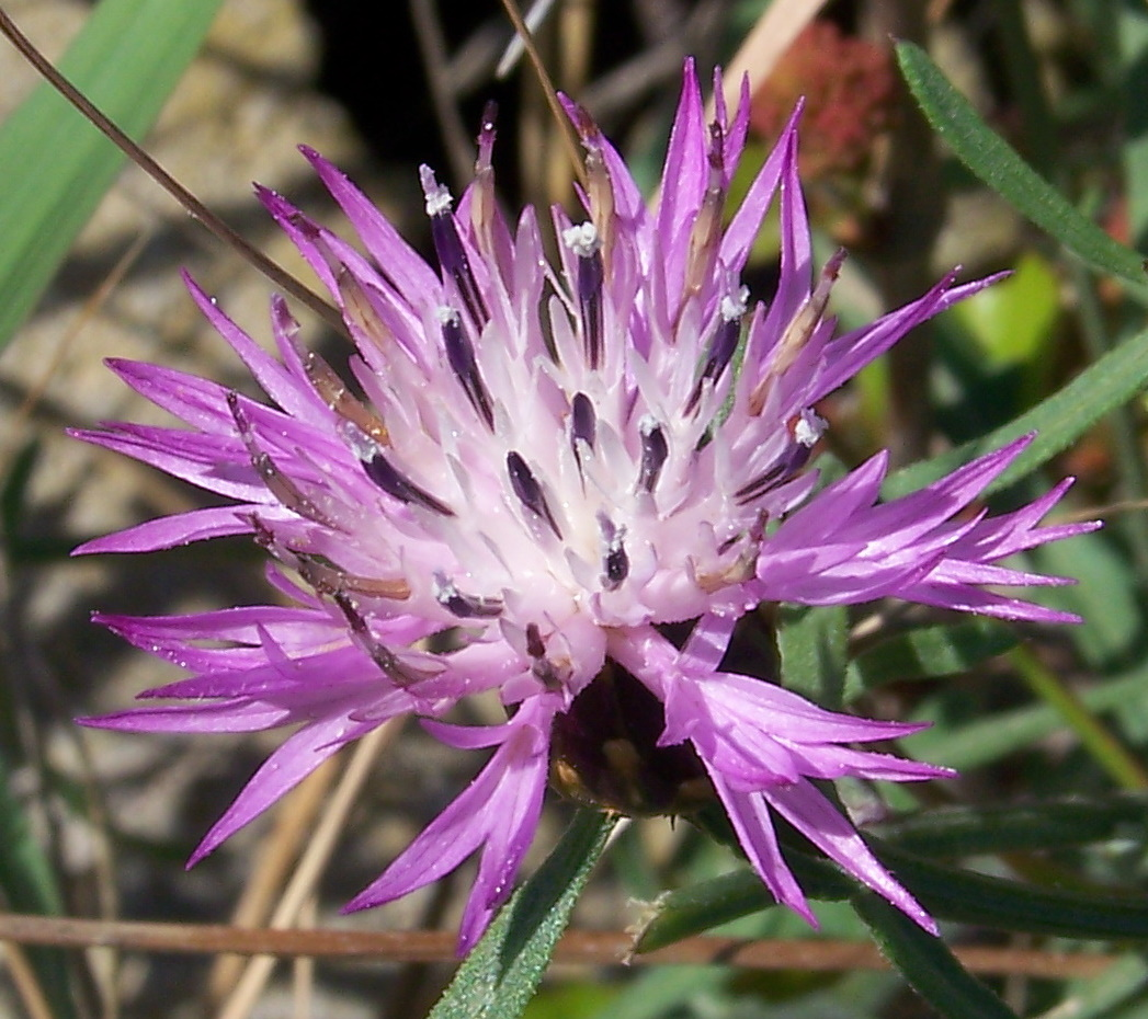 Centaurea gr. aspera - Detalle del capítulo, con flósculos periféricos estériles y mucho más largos que los internos - Camino del Derramador de la Algüeda, Albatera (Alicante, España).